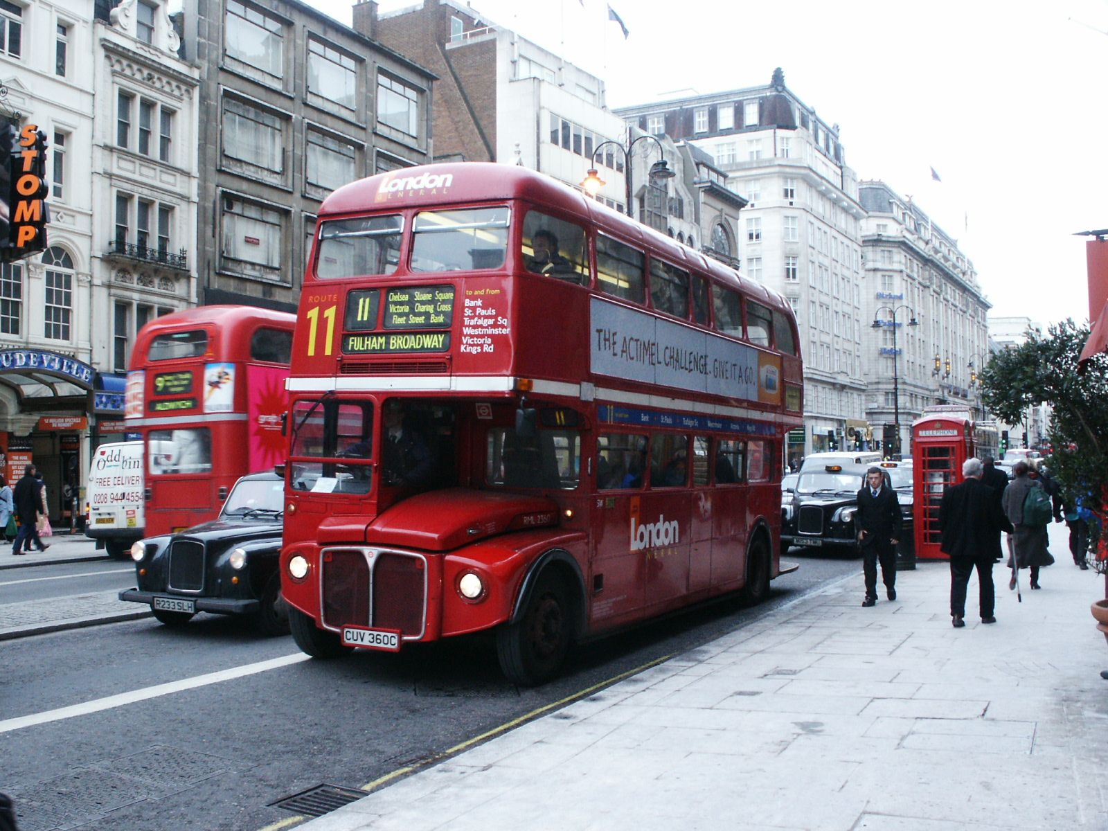 2360-CUV360C 301003 CPS